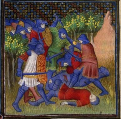 Bataille entre Hébreux et Madianites extrait de: Guiard des Moulins, Bible historiale, France, Paris, XVe siècle Adresse original